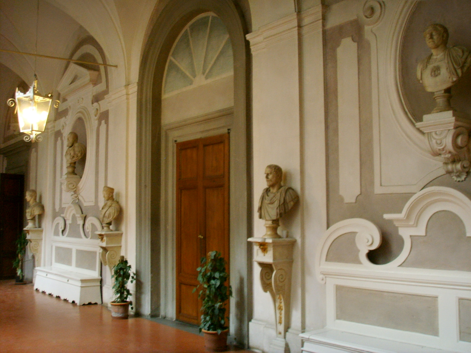 Villa_di_Poggio_Imperiale, cortile